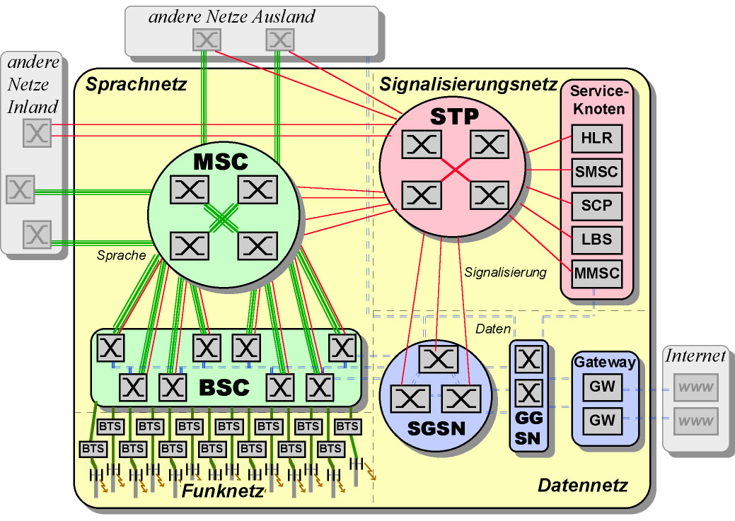 Prinzipielle Struktur des Mobilfunk-Netzes